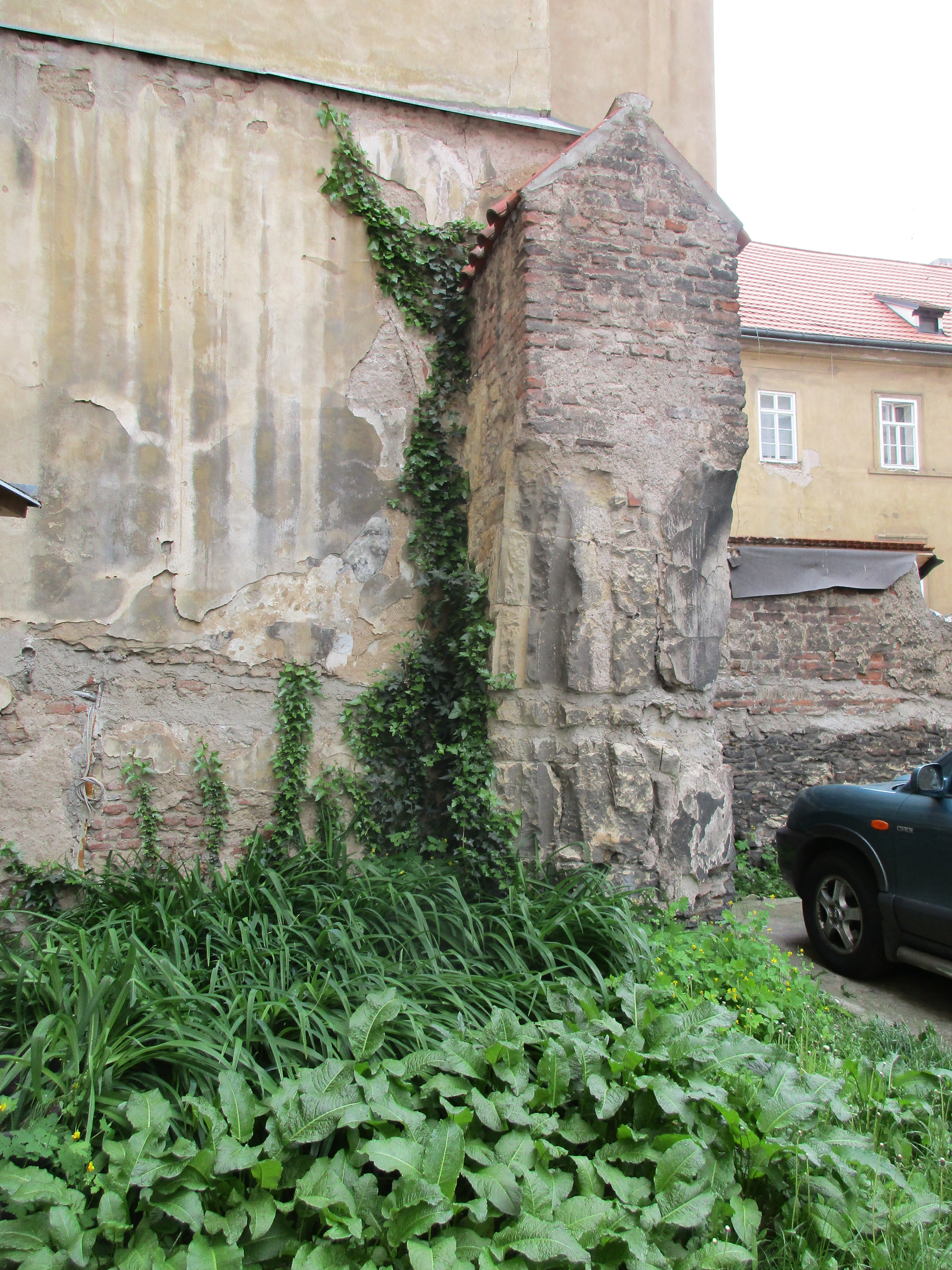 Zbytek zdi zaniklého kostela Petra a Pavla v klášteře Řádu křižovníků - strážců Božího hrobu na Zderaze.